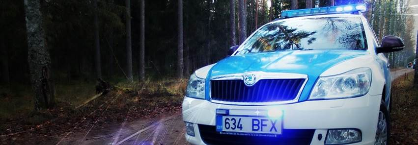 Lõuna prefektuur